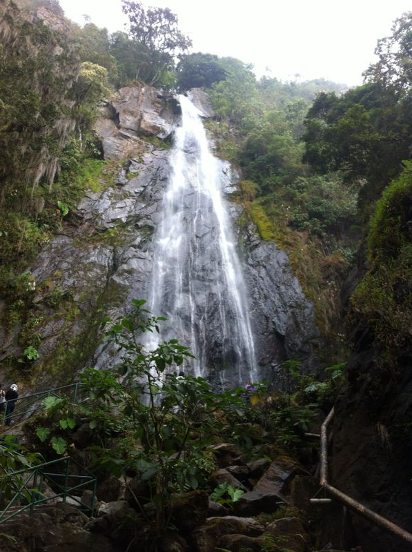 Vista de la Cascada de la India Carú en el bello pueblo de bailadores, Estado Merida, Venezuela.